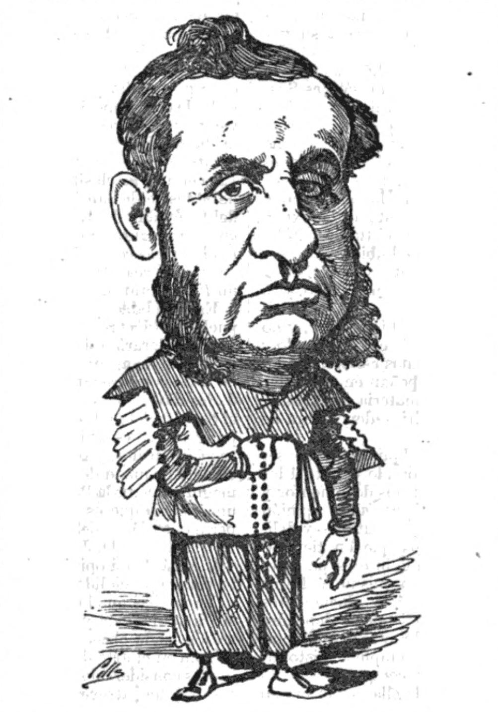 Juan Creus y Manso.